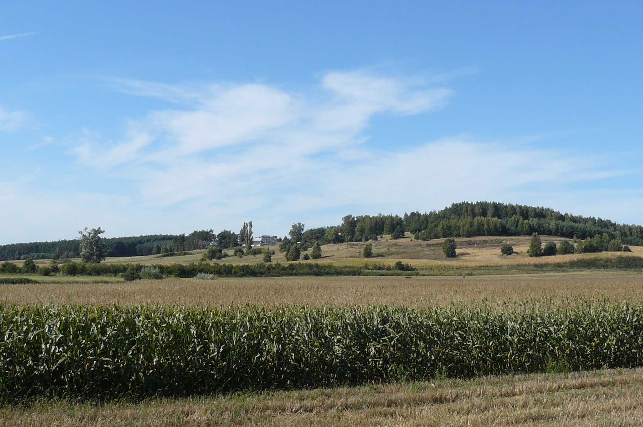 Dolina Noteci w rejonie Morzewa.